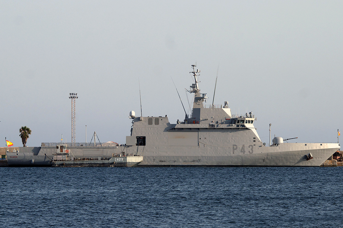 Buque de acción marítima Relampago (P-43) en Cartagena (Provincia de Murcia).